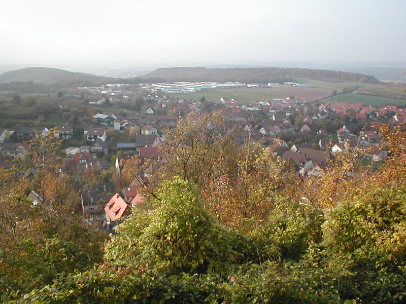 Blick vom Schlossberg nach Norden über Sternenfels, Enzkreis, Baden-Württemberg